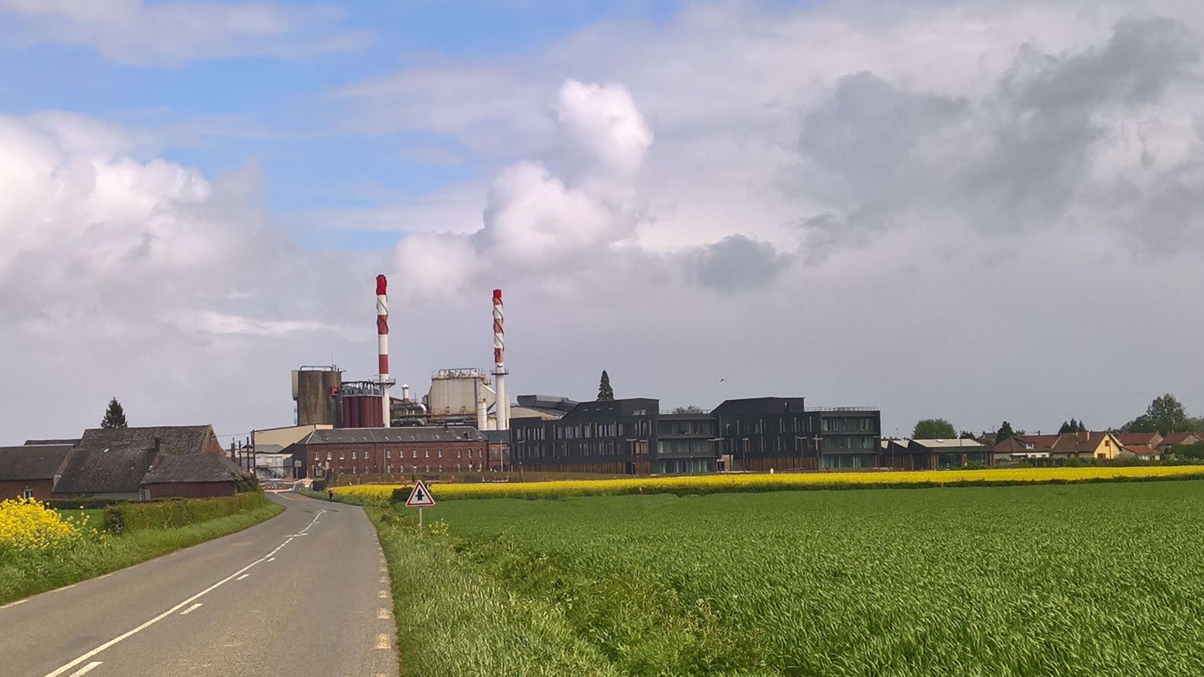 Feuquières : L'entrée du bourg est marquée par la présence de la verrerie Saverglass, qui vient d'aménager au centre du cliché son nouveau siège social